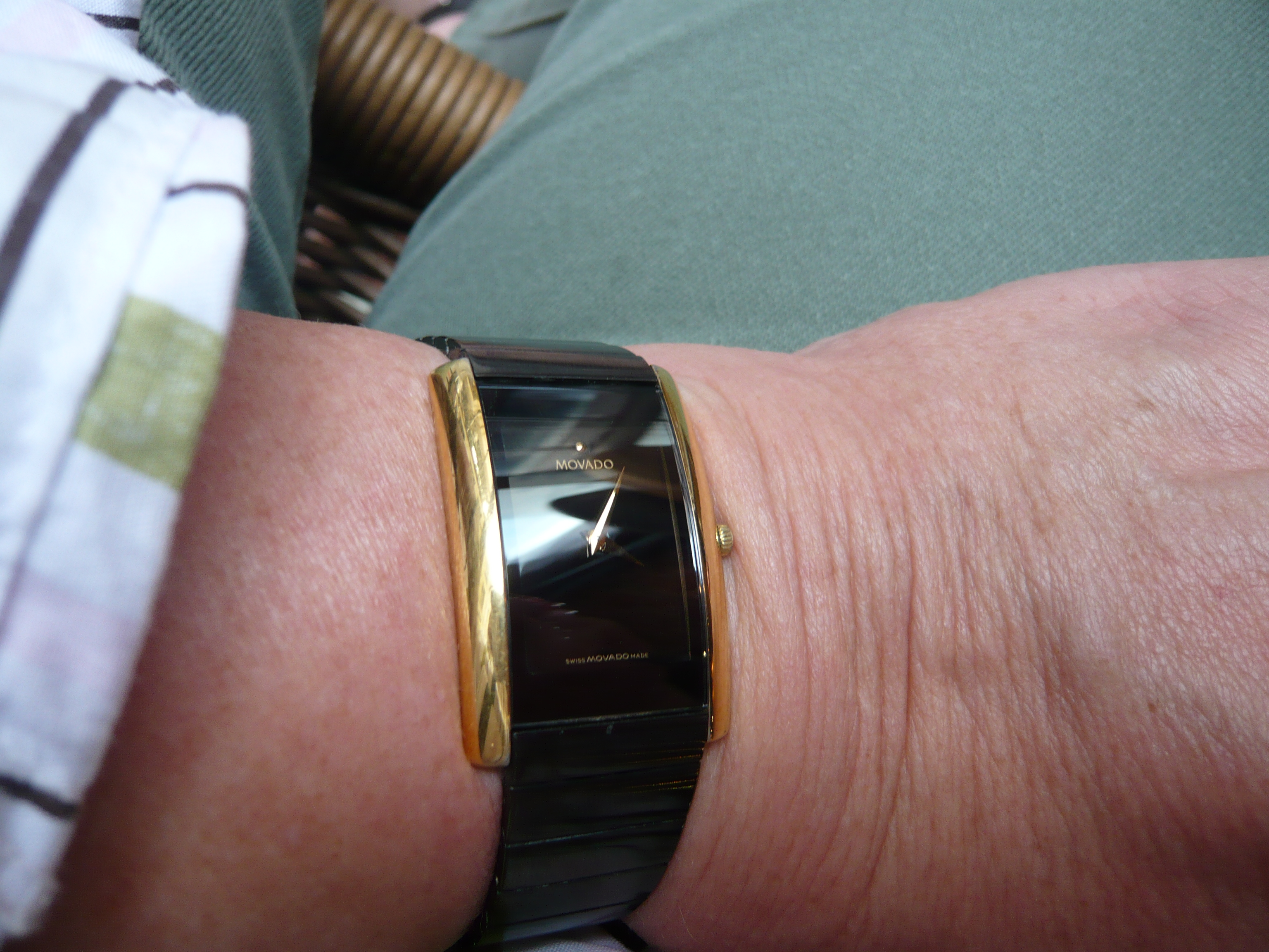 swiss watch mark MOVADO